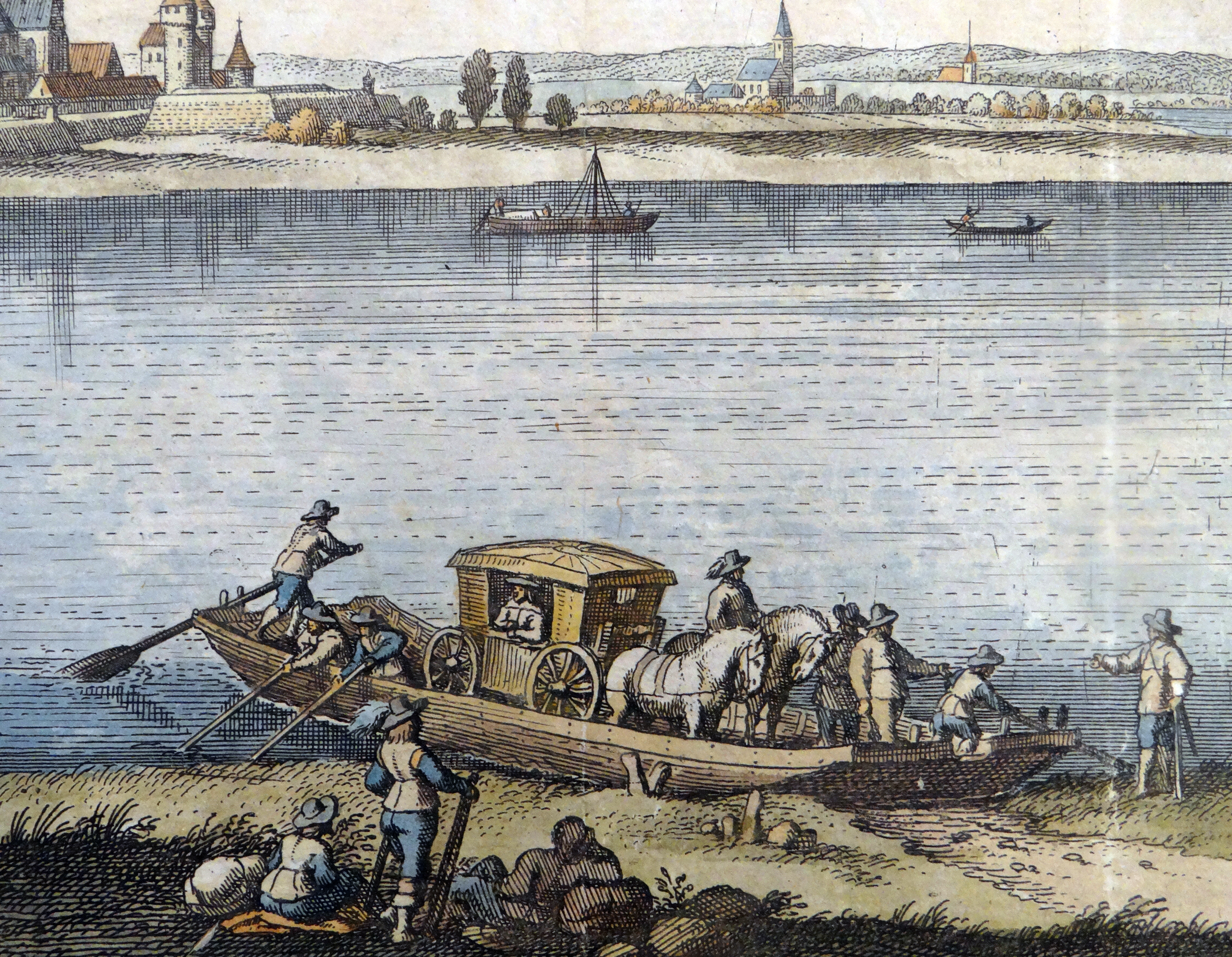 Rheinfähre Worms im 17. Jahrhundert. Detail aus: Matthäus Merian: Topographia Palatinus Rheni et Vicinarum Regionum. Hoffmann, Frankfurt 1645, Tafel zwischen S. 96 u. 97. Stadtarchiv Worms: Abt. 217 Nr. 1495.